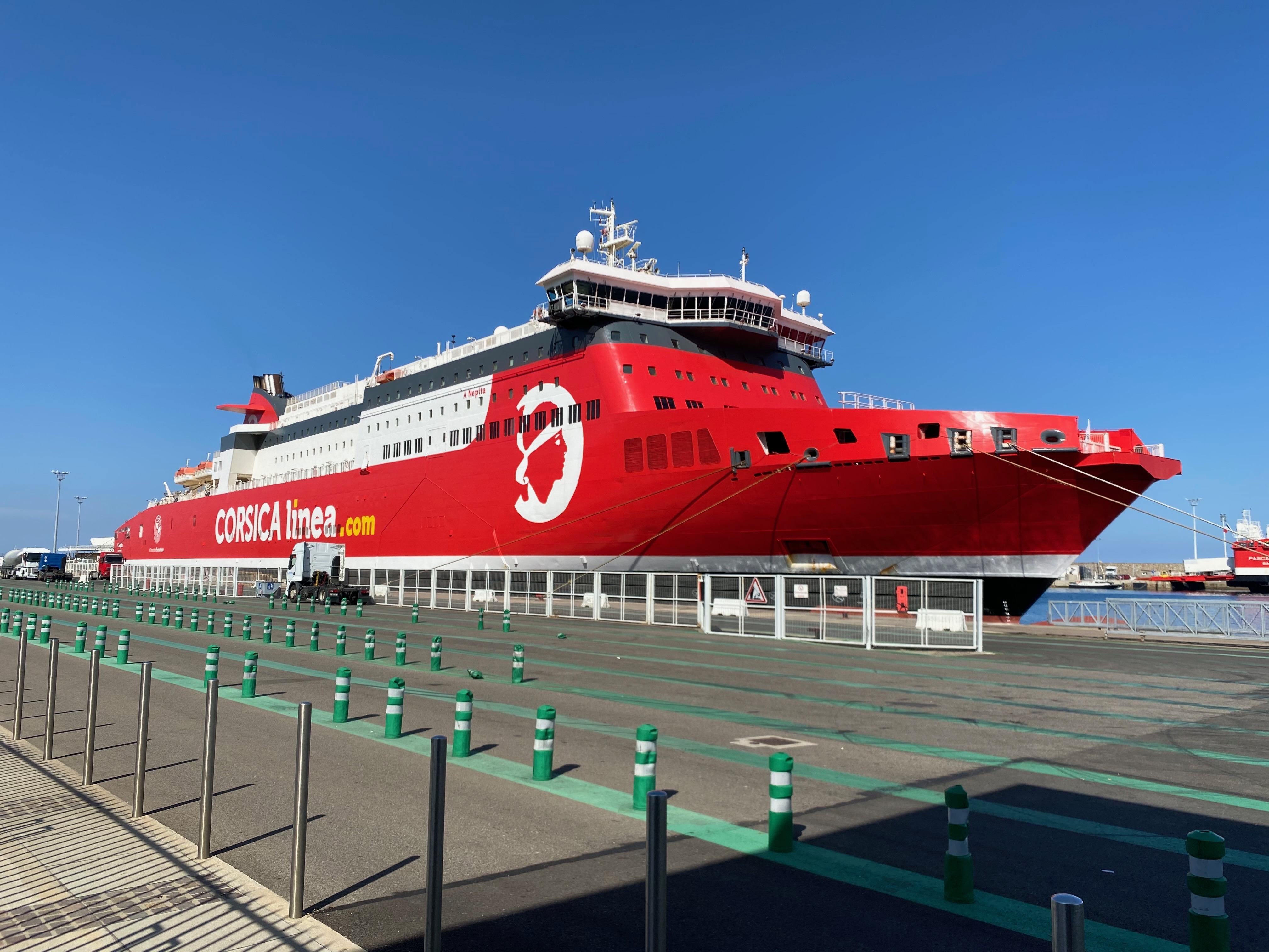 Navire A Nepita de la compagnie Corsica Linea à Bastia en juillet 2020.